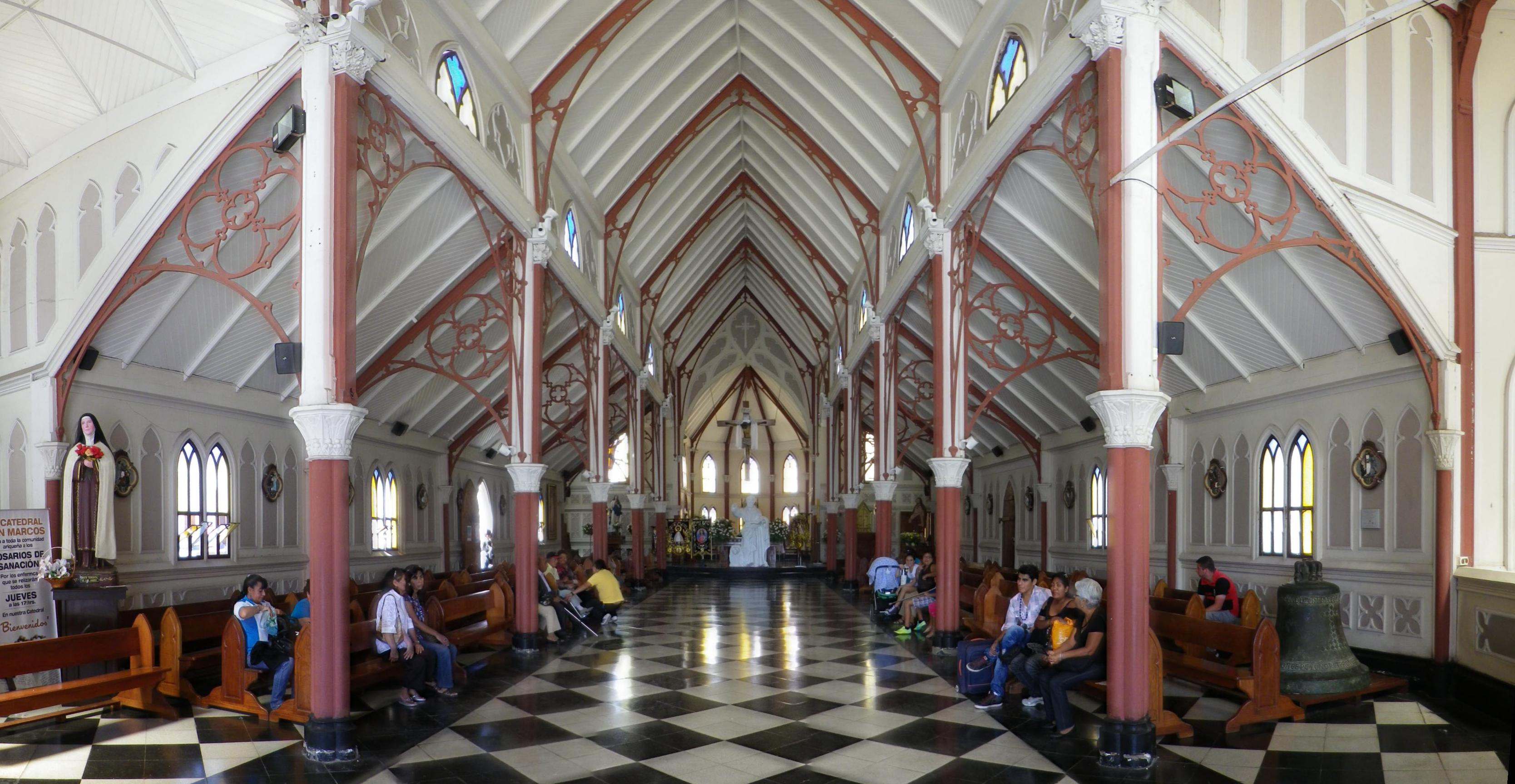 Catedral de San Marcos, en Arica. Diseñada por el ingeniero frances Gustave Eiffel. Construida integramente de metal.